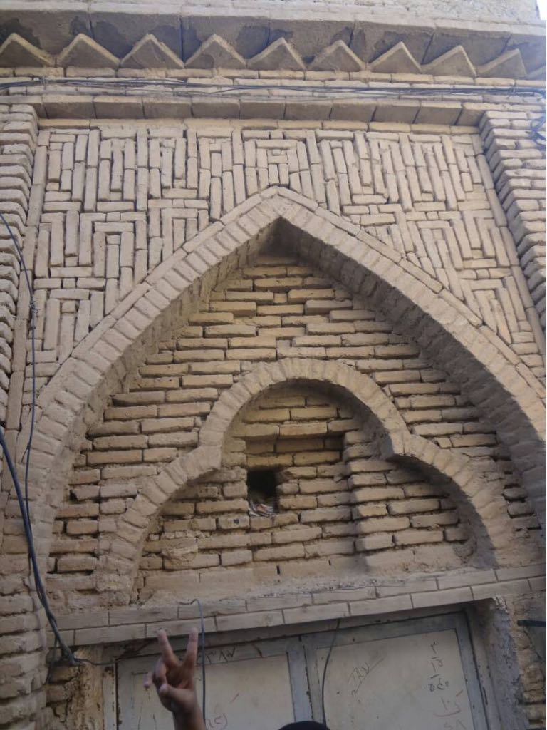 سر در مهمانسرا کوشک قاضی اضافه شد # تقی جعفرزاده